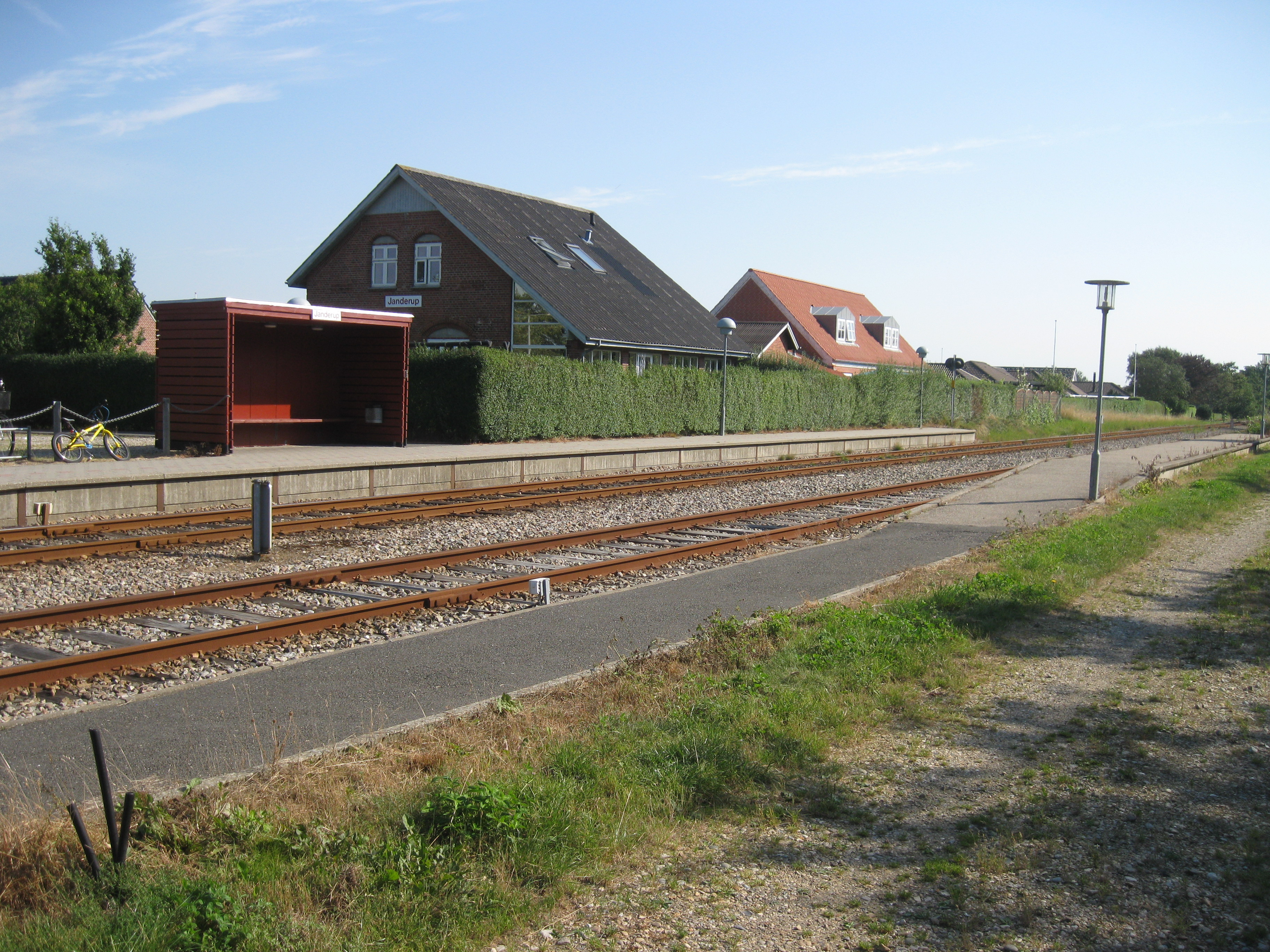 Janderup Station på Vestbanen